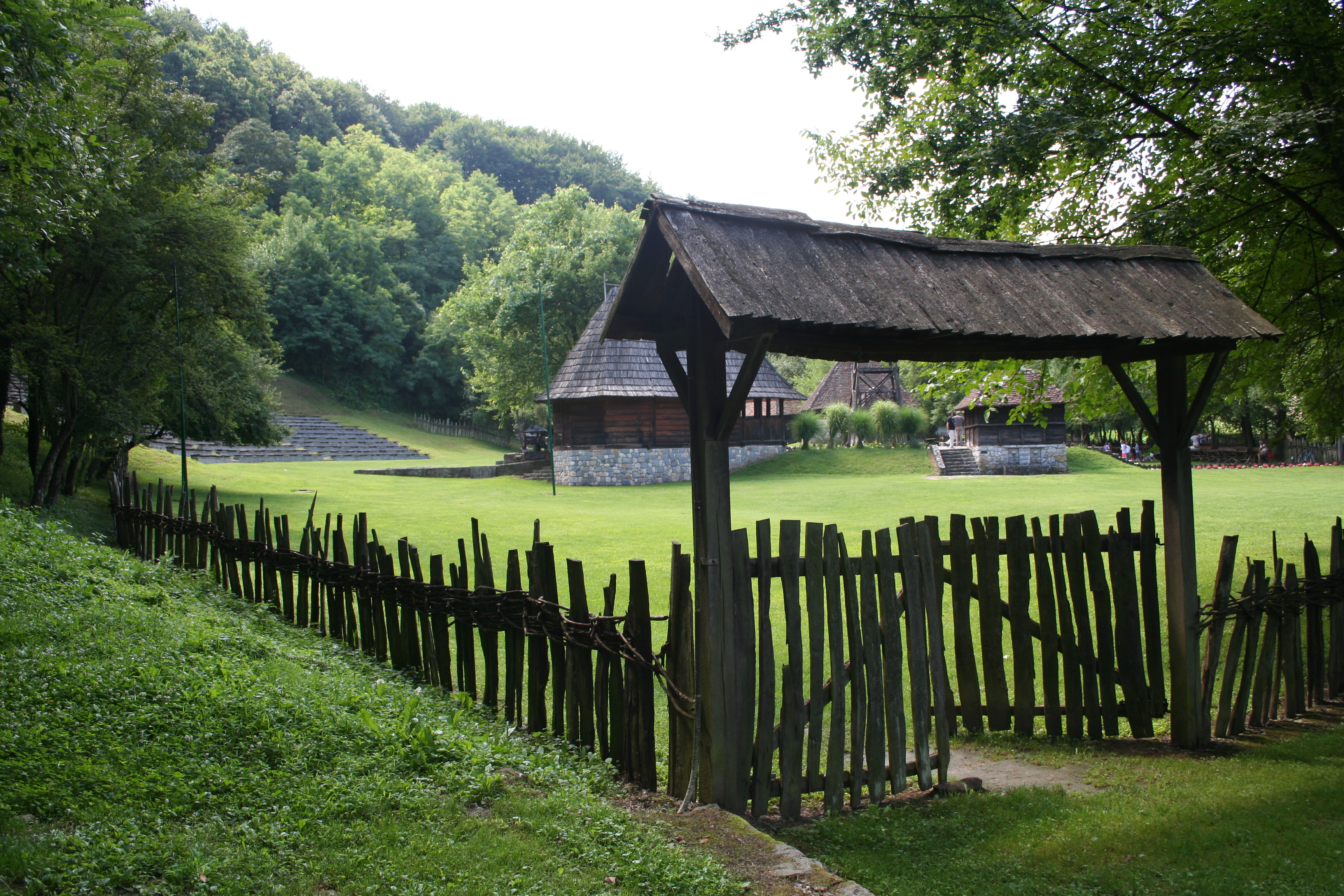 Spomen-kompleks Vuk Stefanović Karadžić, Tršić